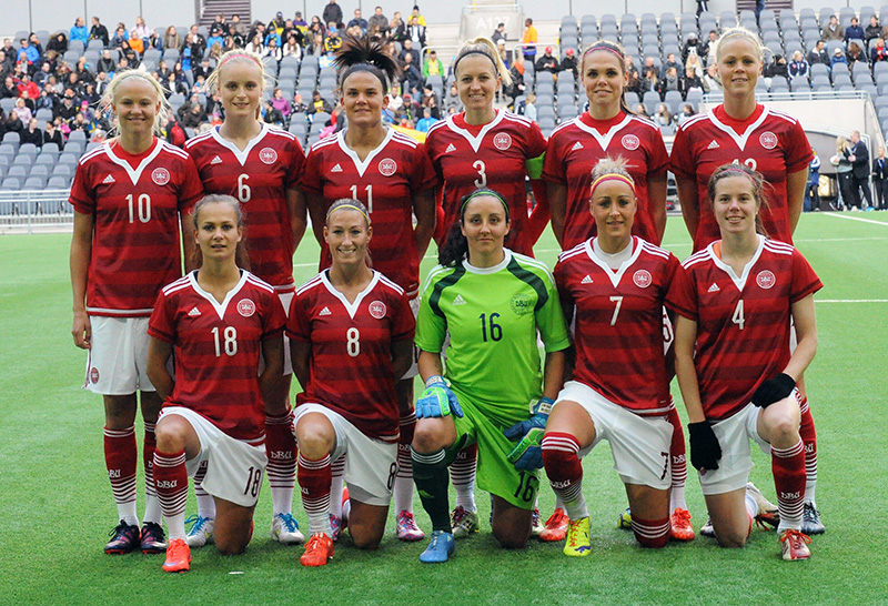 Denmark team v Sweden: Back row (L-R): Pernille Harder, Nina Frausing Pedersen, Katrine Veje, Janni Arnth Jensen, Simone Boye Sørensen, Julie Tavlo Petersson Front row (L-R): Frederikke Thøgersen, Theresa Nielsen, Cecilie Breil Kramer, Sanne Troelsgaard Nielsen, Sofie Junge Pedersen